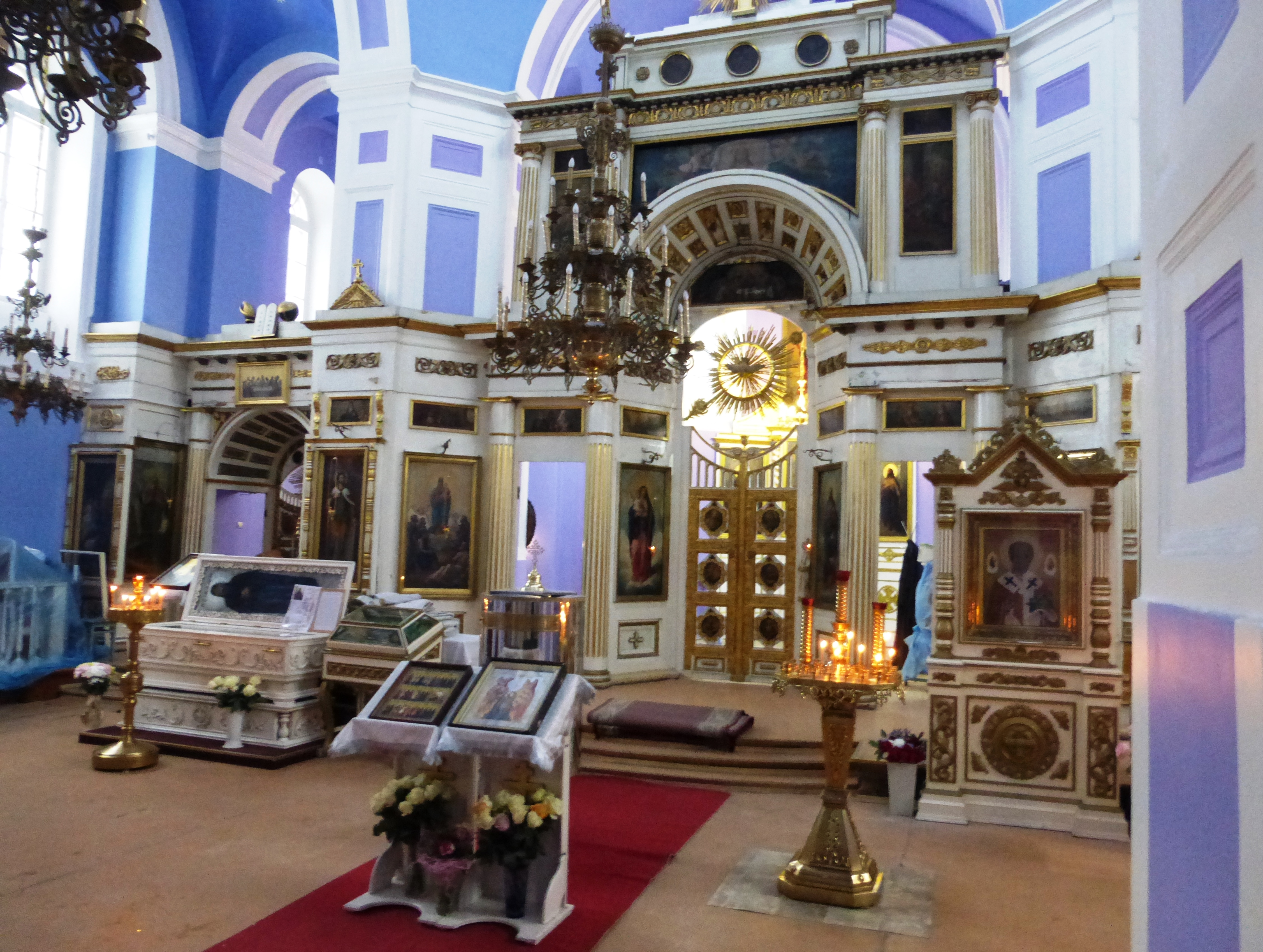 Внутреннее убранство Крестовоздвиженского собора (Петрозаводск).